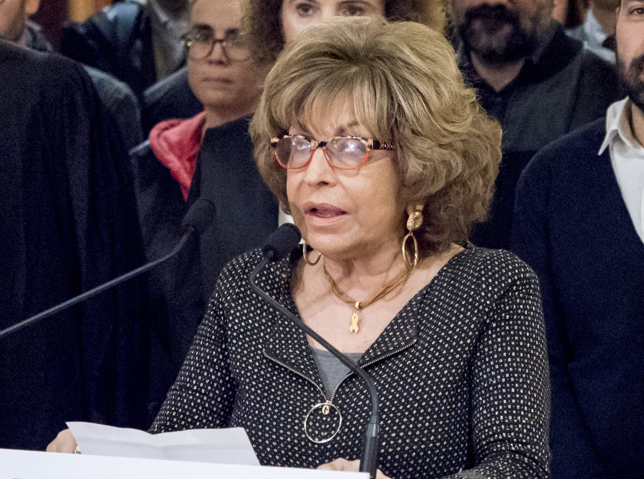 Òmnium ha presentat el seu escrit d'acusació en un acte al Pati de Columnes del Col·legi d'Advocats amb el suport de tot l'equip de defensa del president de l'entitat i més de mig centenar de professionals del món del dret